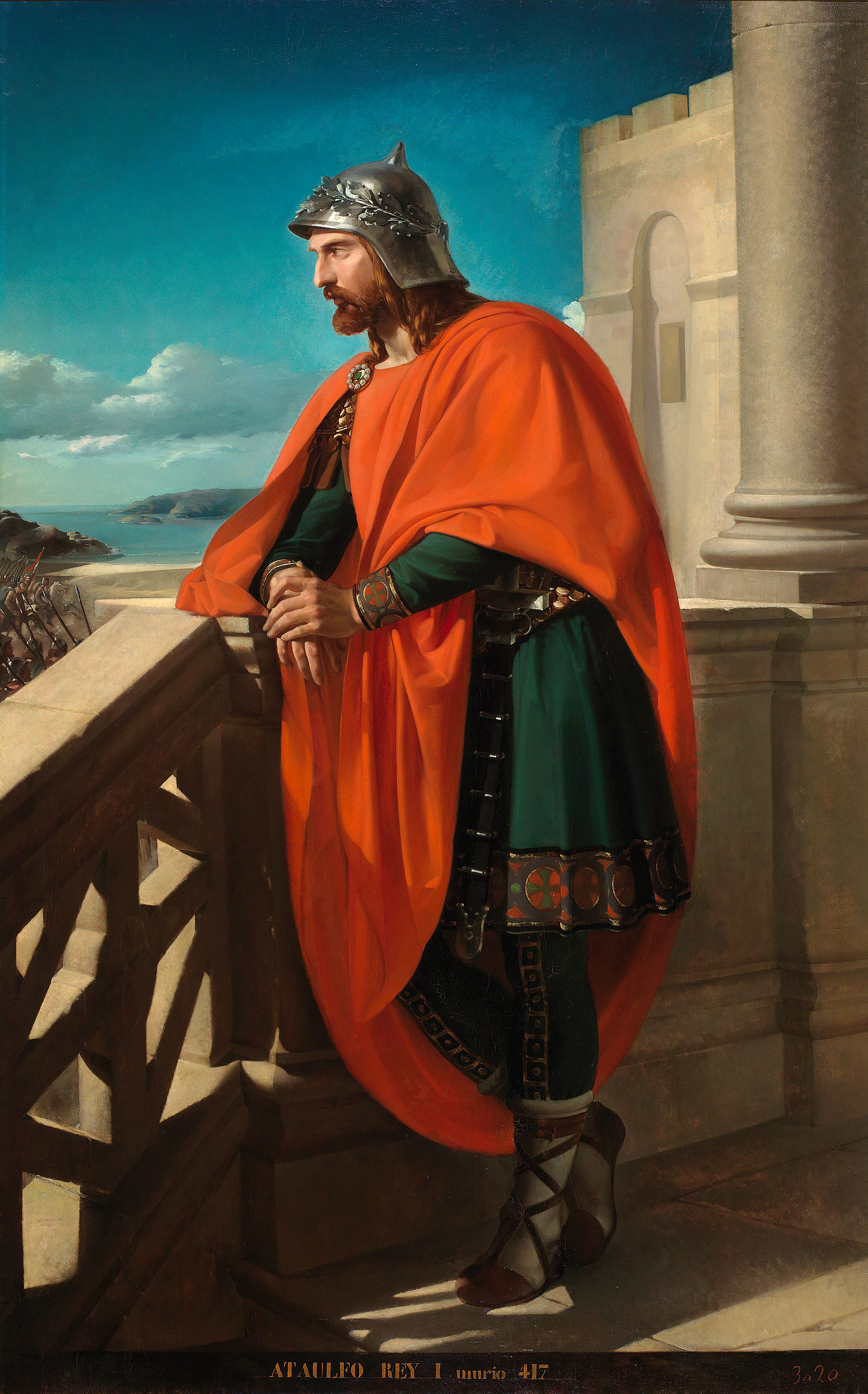 El lienzo representa a Ataúlfo († 415), rey de los Visigodos y cuñado y sucesor del rey Alarico I.